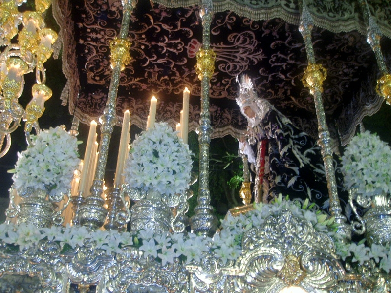 Virgen del Gran Poder, conocida como la reina de plata